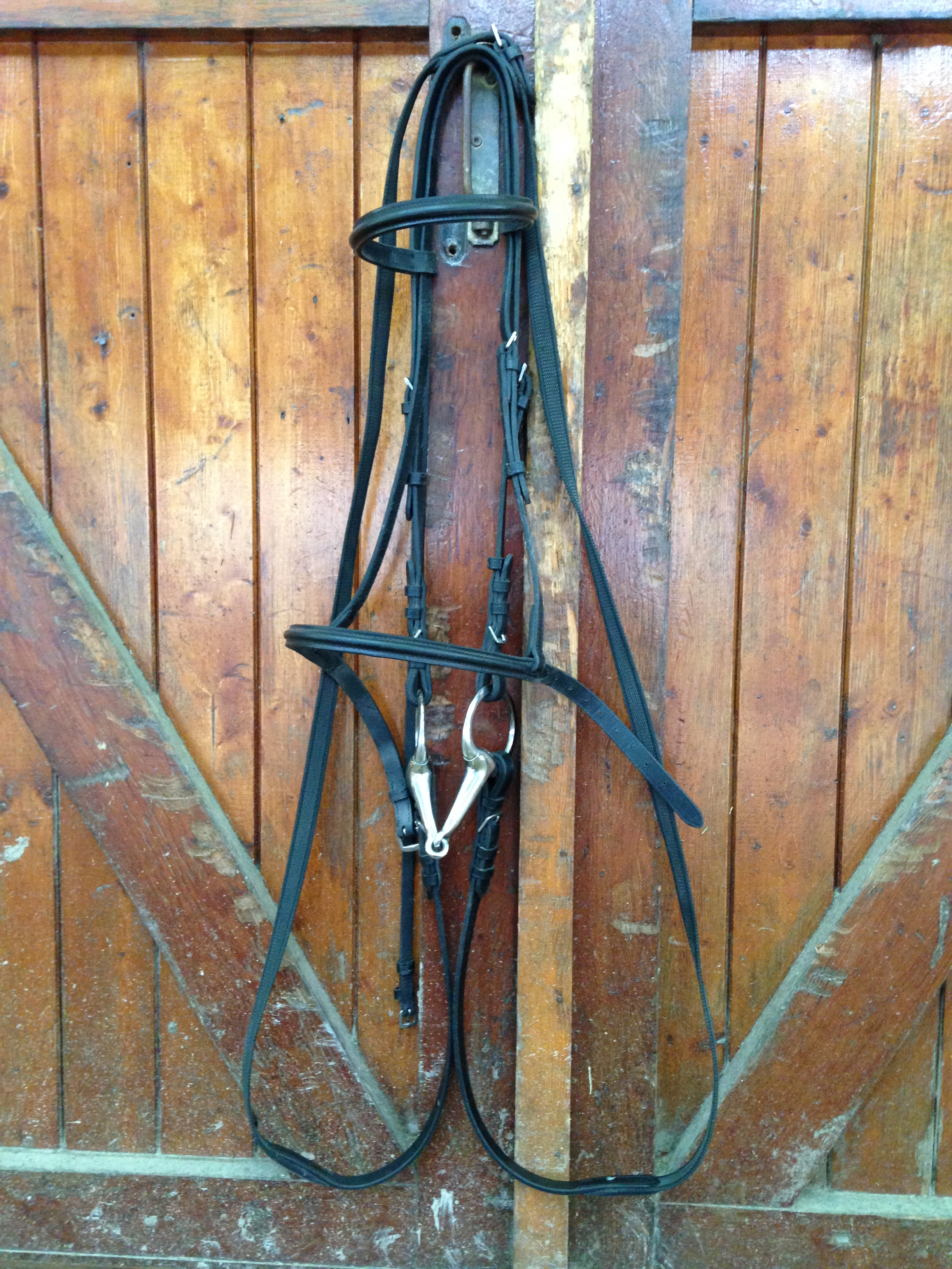 Filet suspendu